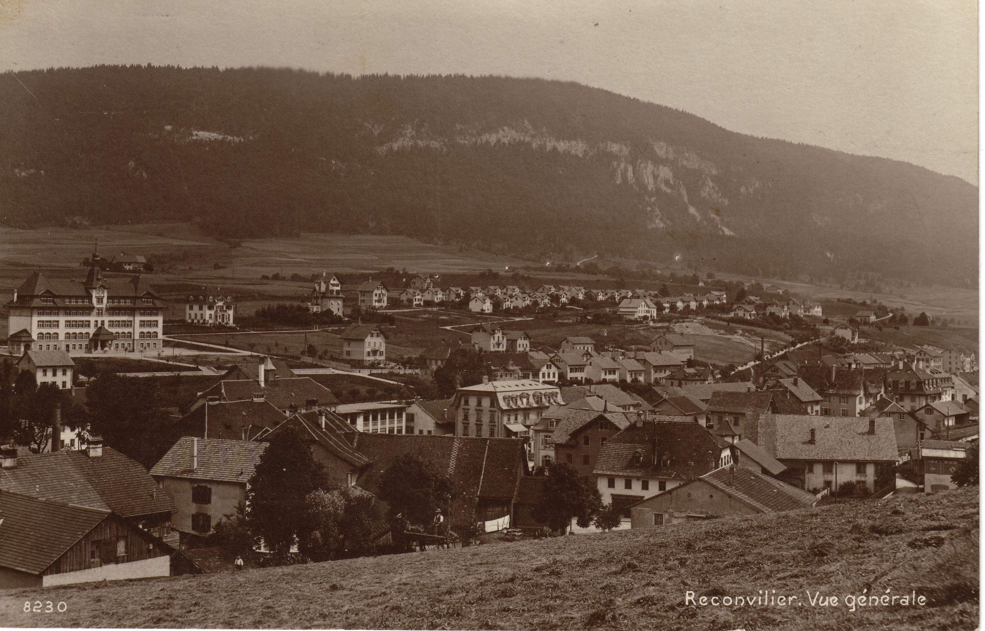 Carte postale de Reconvilier en 1919. La date précise est inconnue, la seul information est le timbrage de la carte (Reconvilier -8 VII.19)